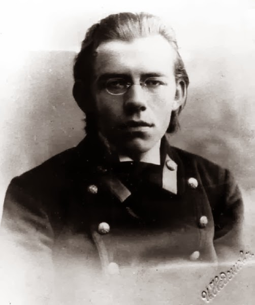 Чижевский Дмитро гімназист